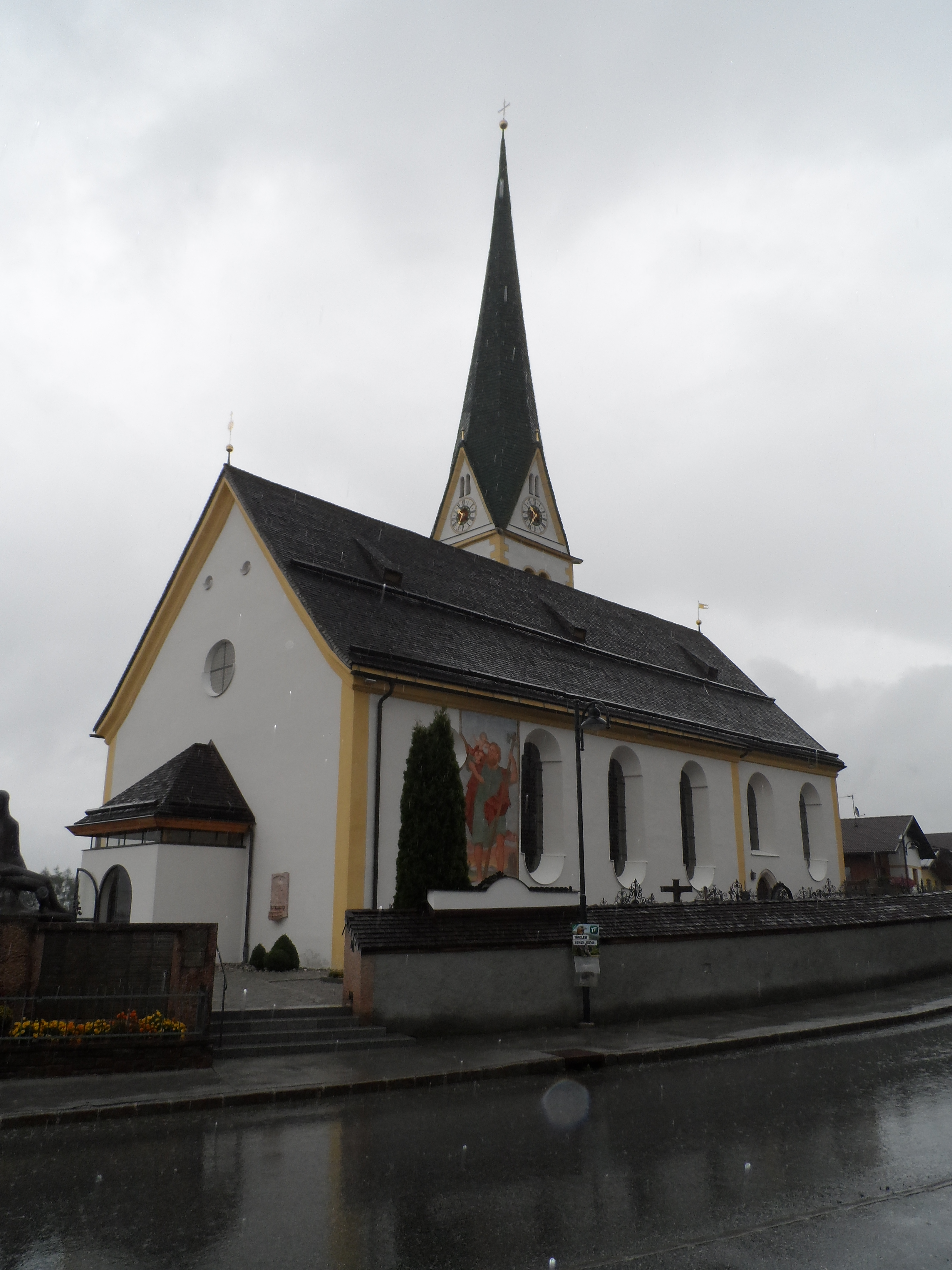 Kath. Pfarrkirche hl. Georg - Brandenberg in Tirol